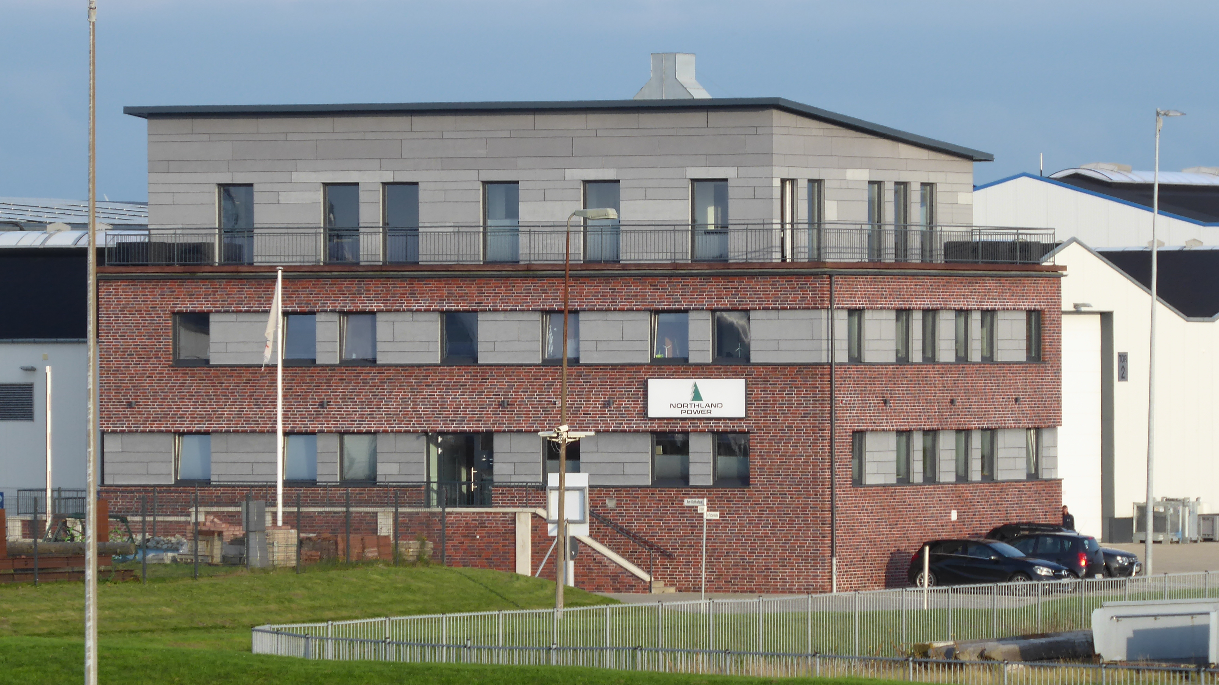 Northland Power Wartungs- und Servicestützpunkt in Norddeich für Offshore-Windparks